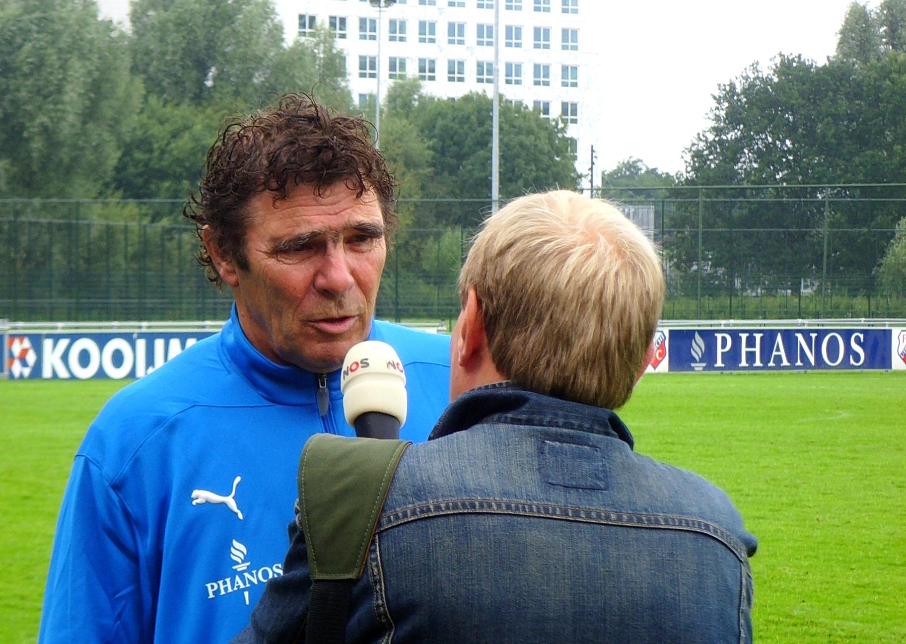 Willem van Hanegem, Nederlands voormalig profvoetballer, staat in zijn functie als hoofdtrainer van FC Utrecht een NOS-journalist te woord na de eerste training van het seizoen 2008-2009